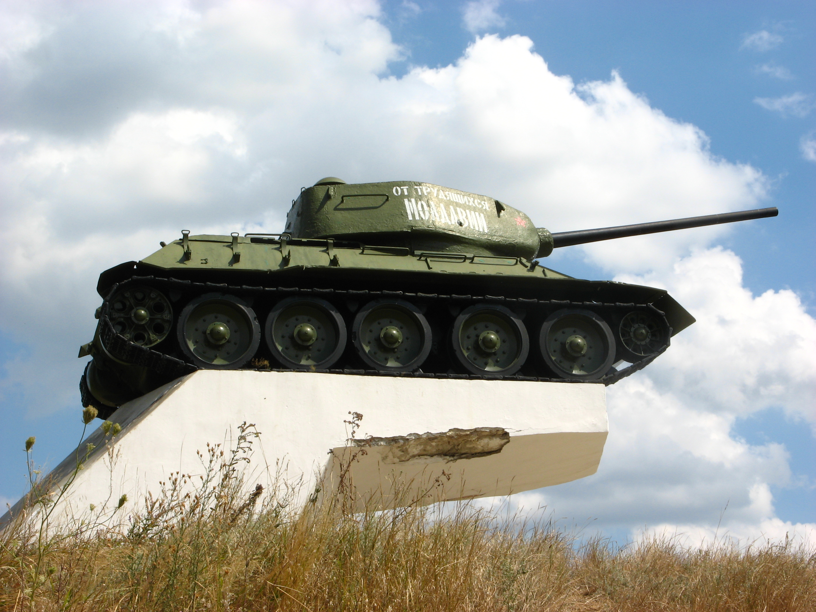 "Monument" din epoca sovietică - tanc T34.